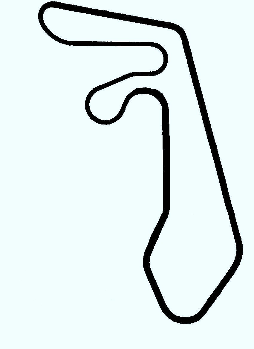 Kemora track, Veteli, Finland